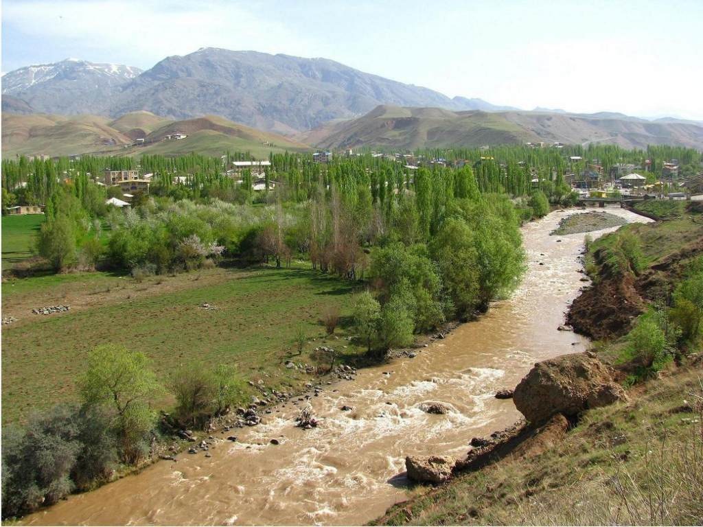 نماي رودخانه شاهرود- نمای جموب غربی به شمال شرقی